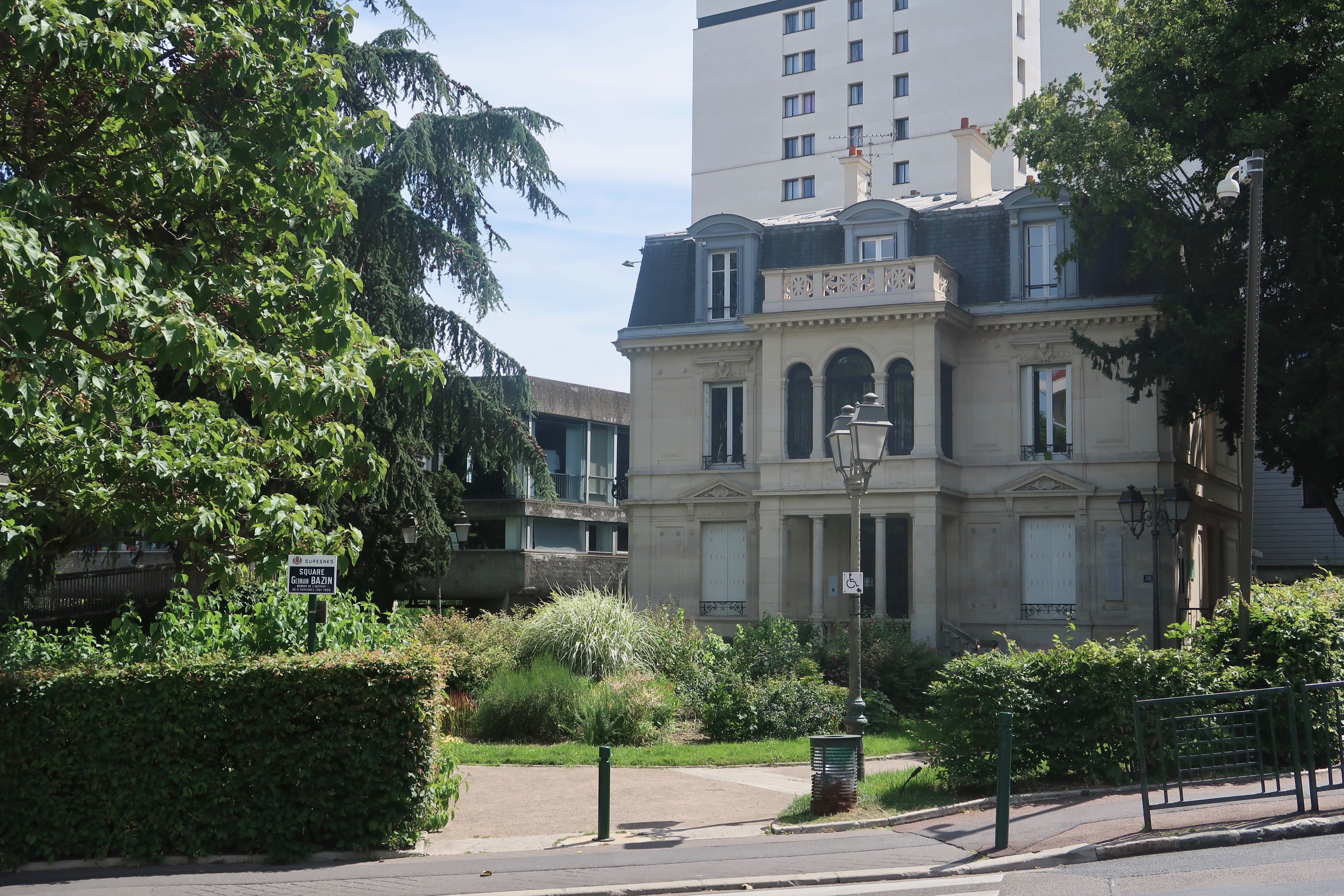 Maison dite château de la Grève située au n°28 rue Merlin de Thionville à Suresnes (Hauts-de-Seine).